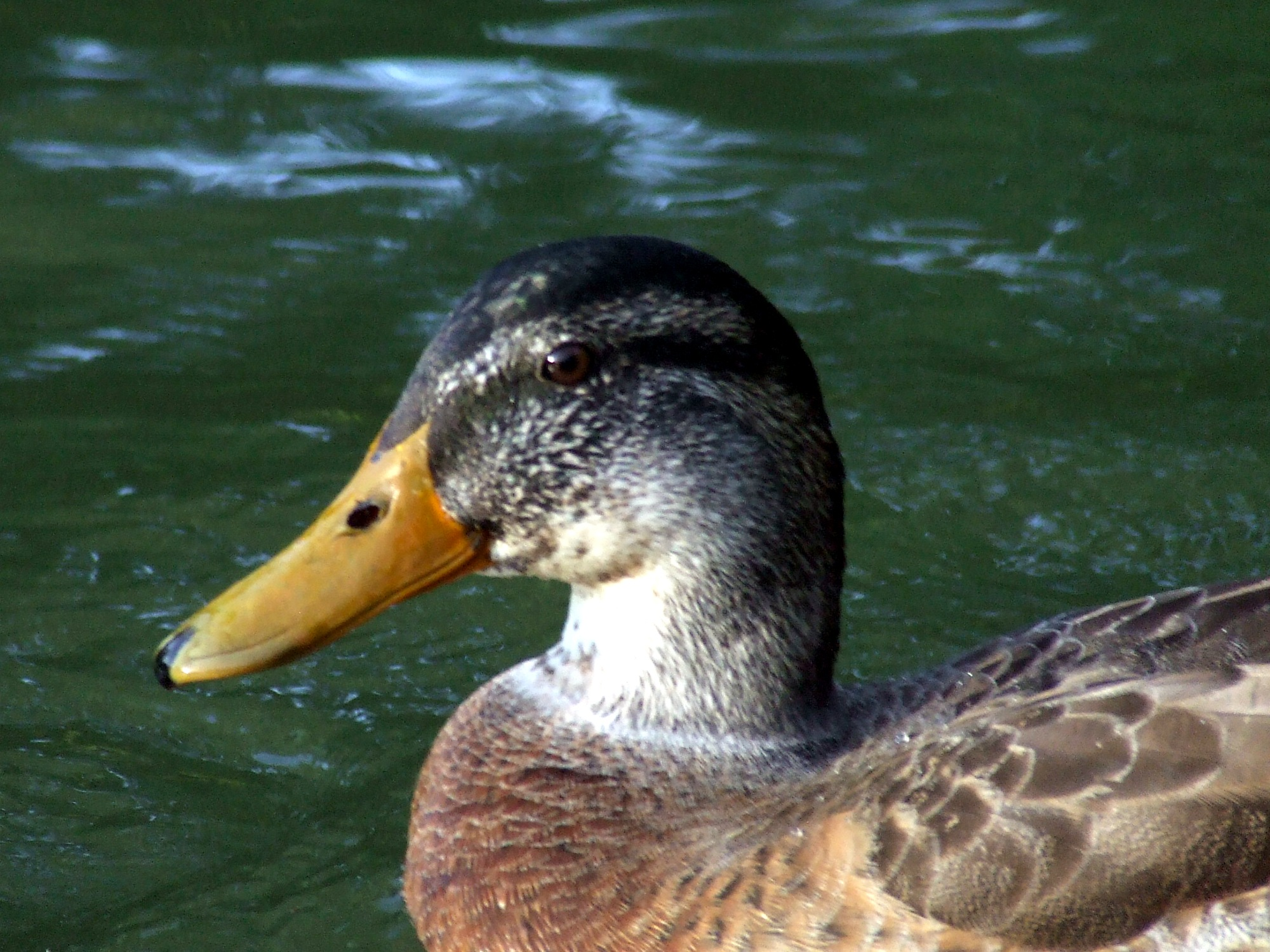 Testa di Anatide a Roma, Giardin del Lago di Villa Borghese